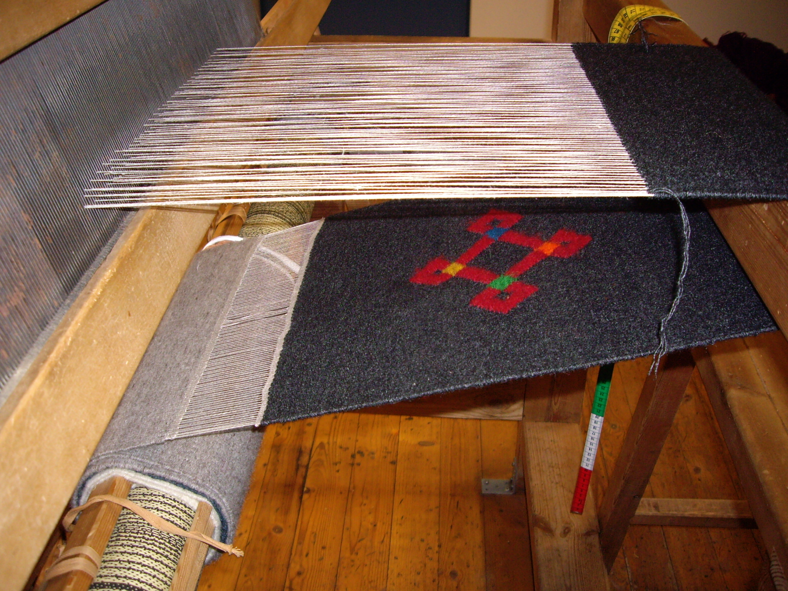 Kangakudumine